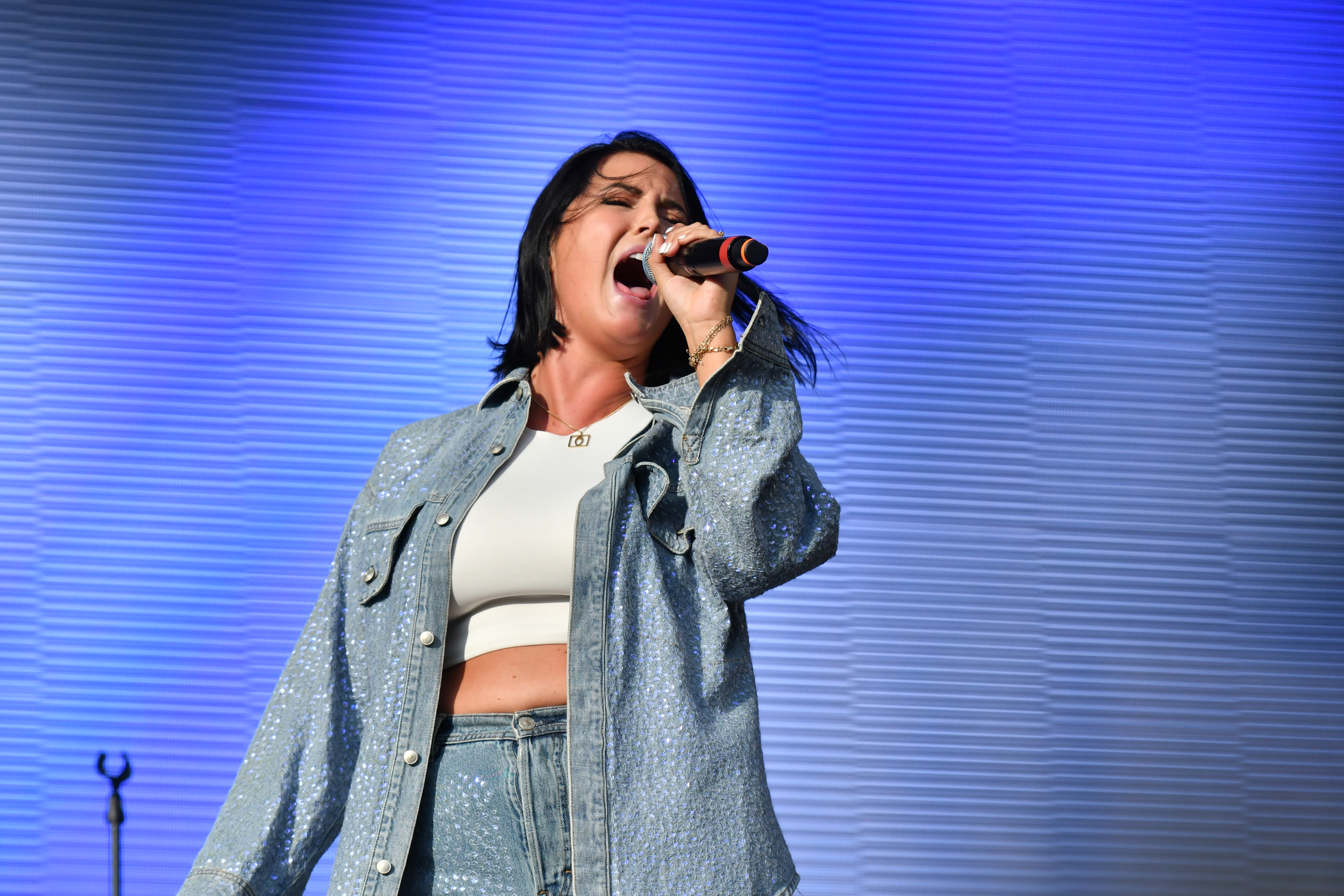 Molly Sandén på Malmöfestivalen, som del av NRJ in the Park.